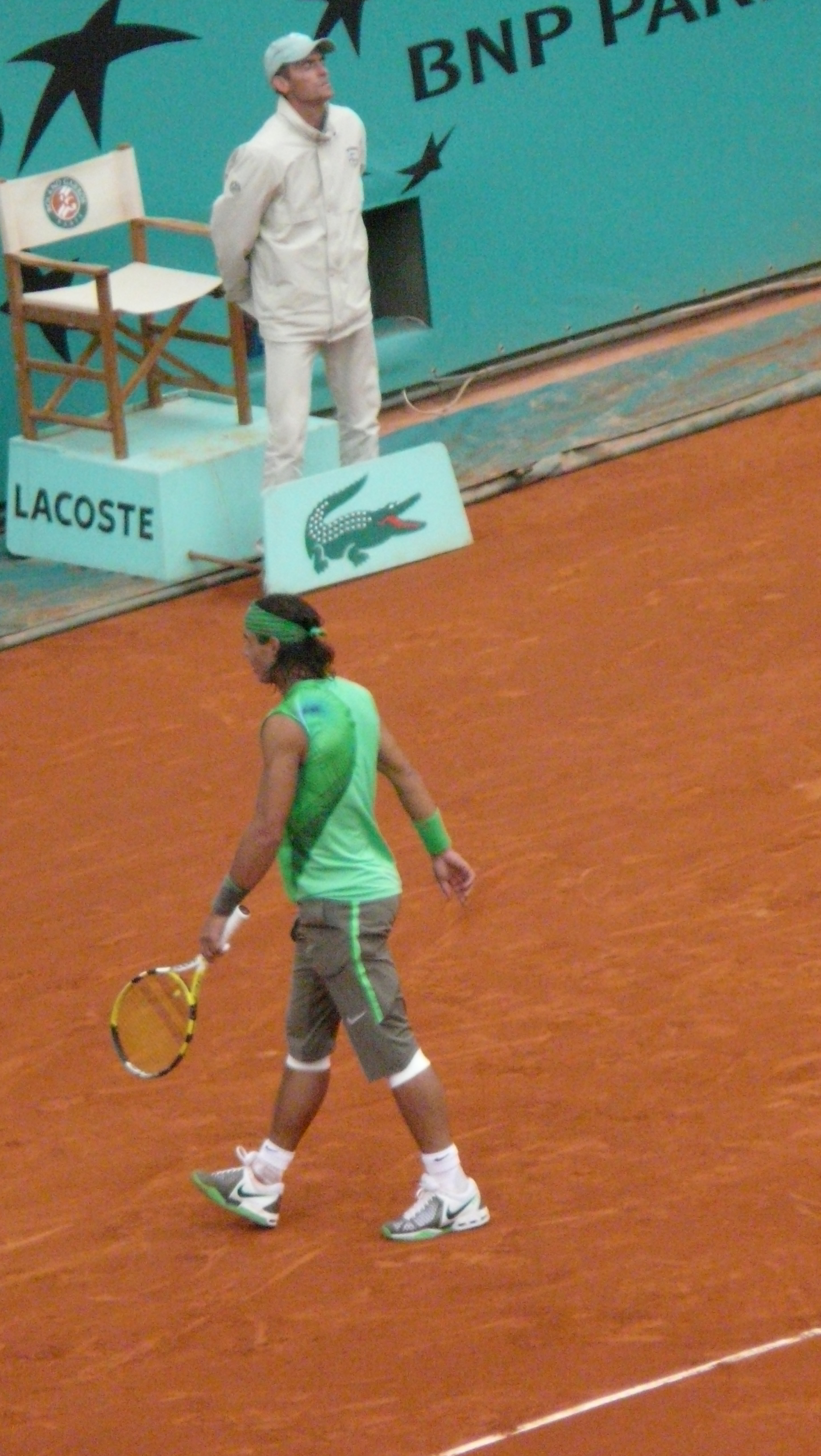 Rafael Nadal en quart de finale de Roland Garros 2008.